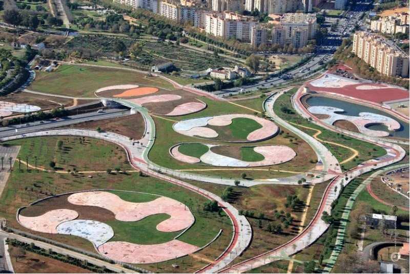 lksalkd